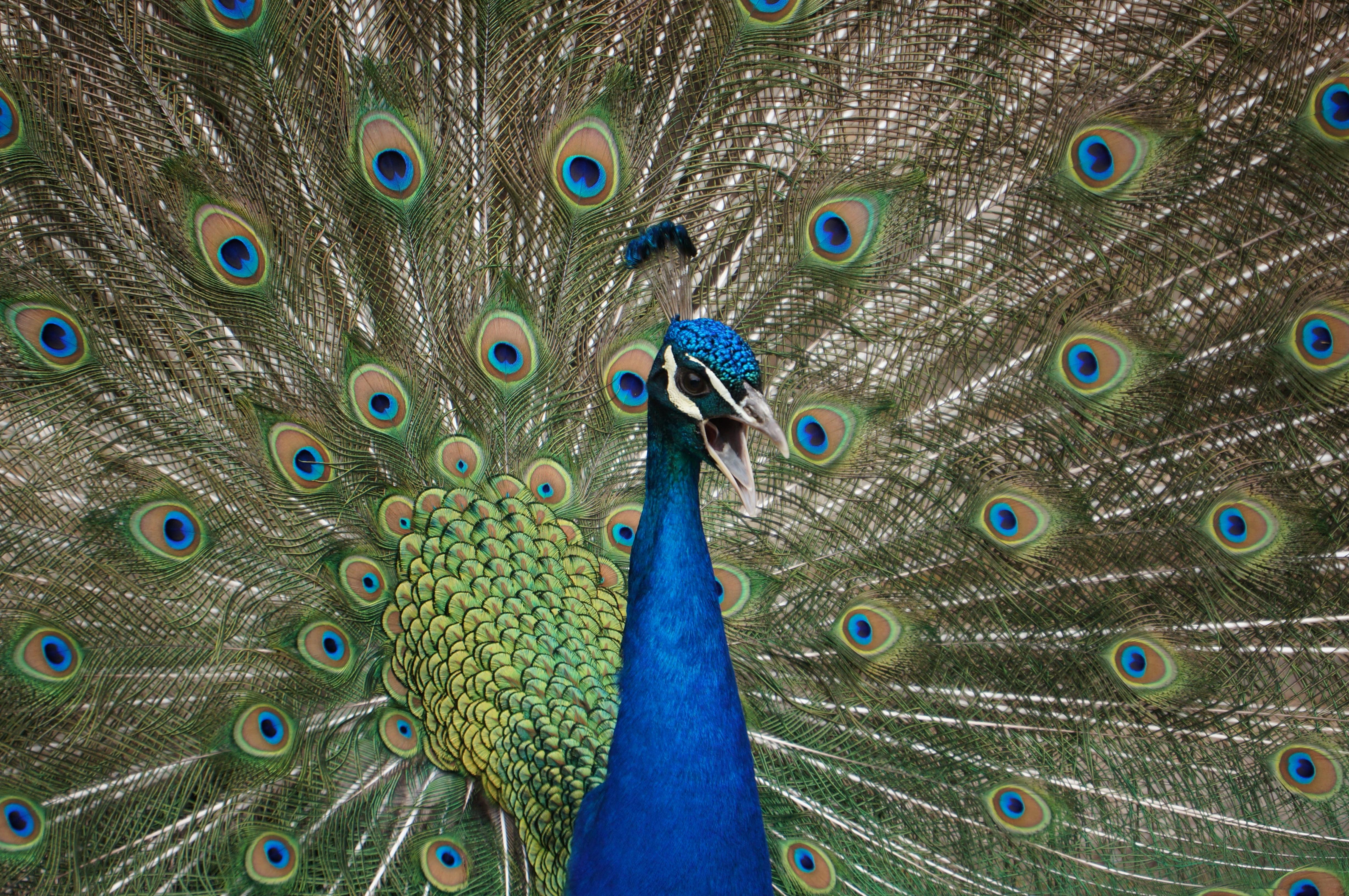 Pavão - 2014